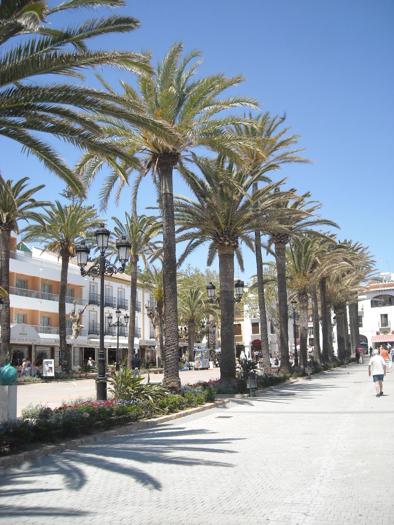 Palmeral en Nerja.